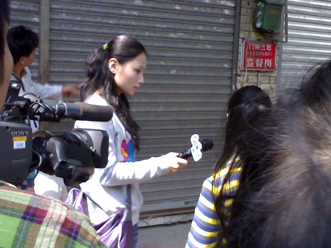 中文（中国大陆）: 在广州街头采访市民的广州电视台G4记者周欢。